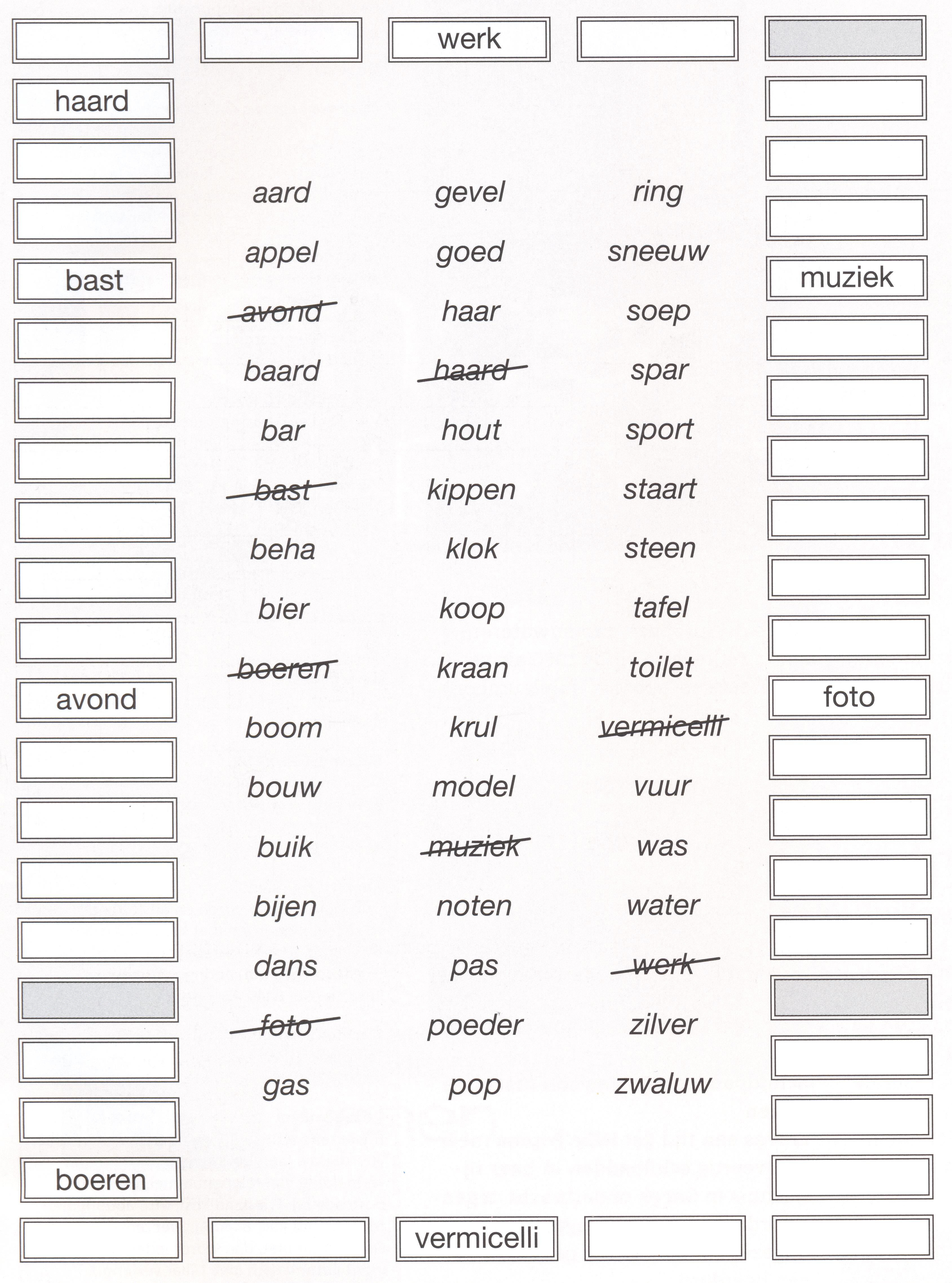 Oanfolpuzel_Wurdriuwen